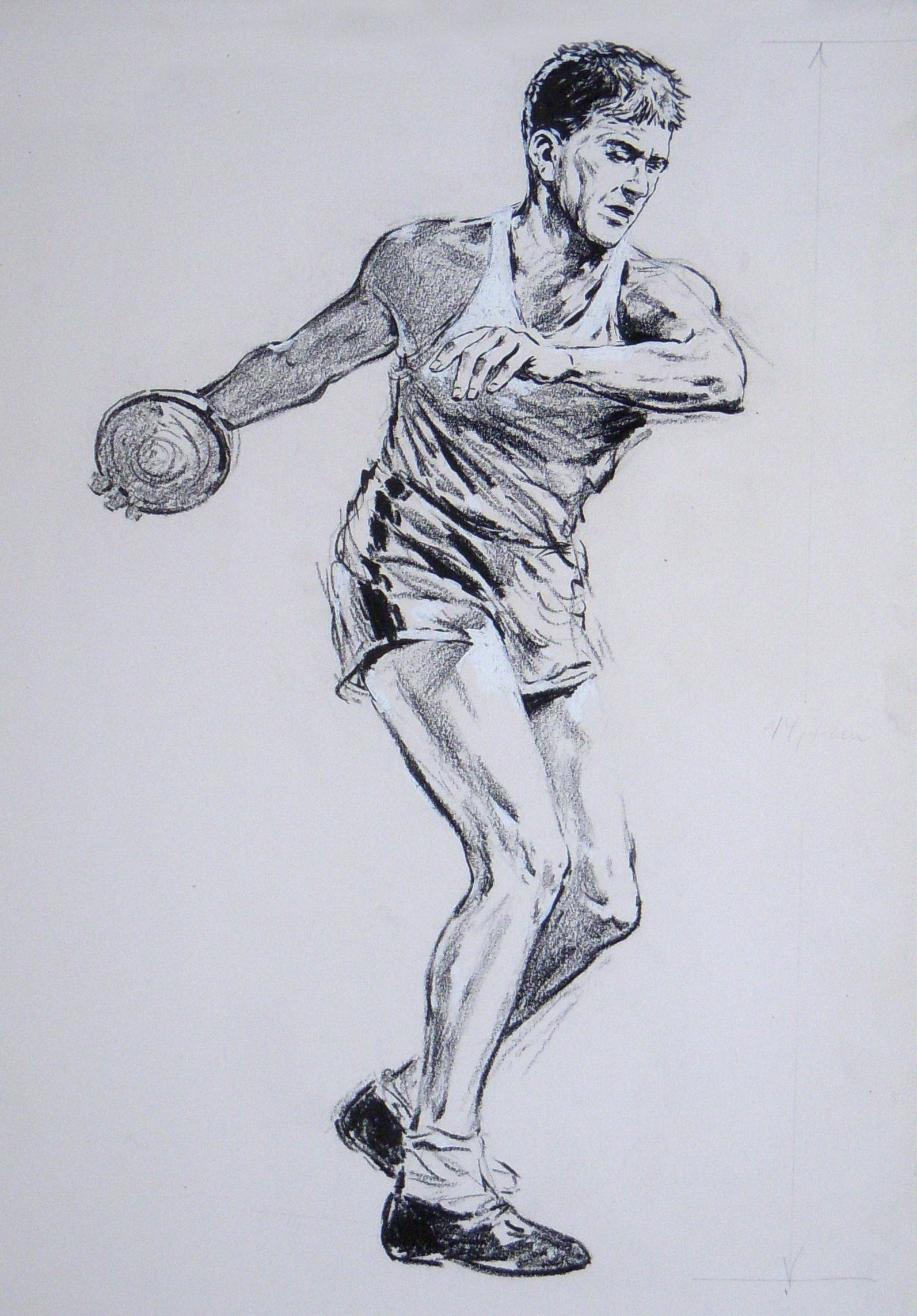 Der Diskuswerfer